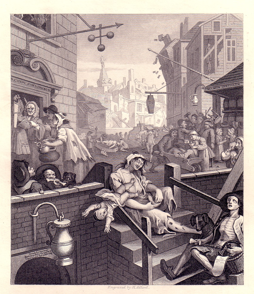 Bierstraße und Ginpfad 2 (Beer Street and Gin Lane 2) von William Hogarth, Stahlstich um 1860